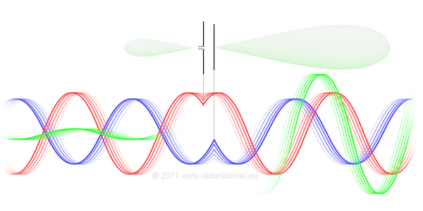 Funktion eines Direktors einer Yagiantenne als parasitärer Strahler